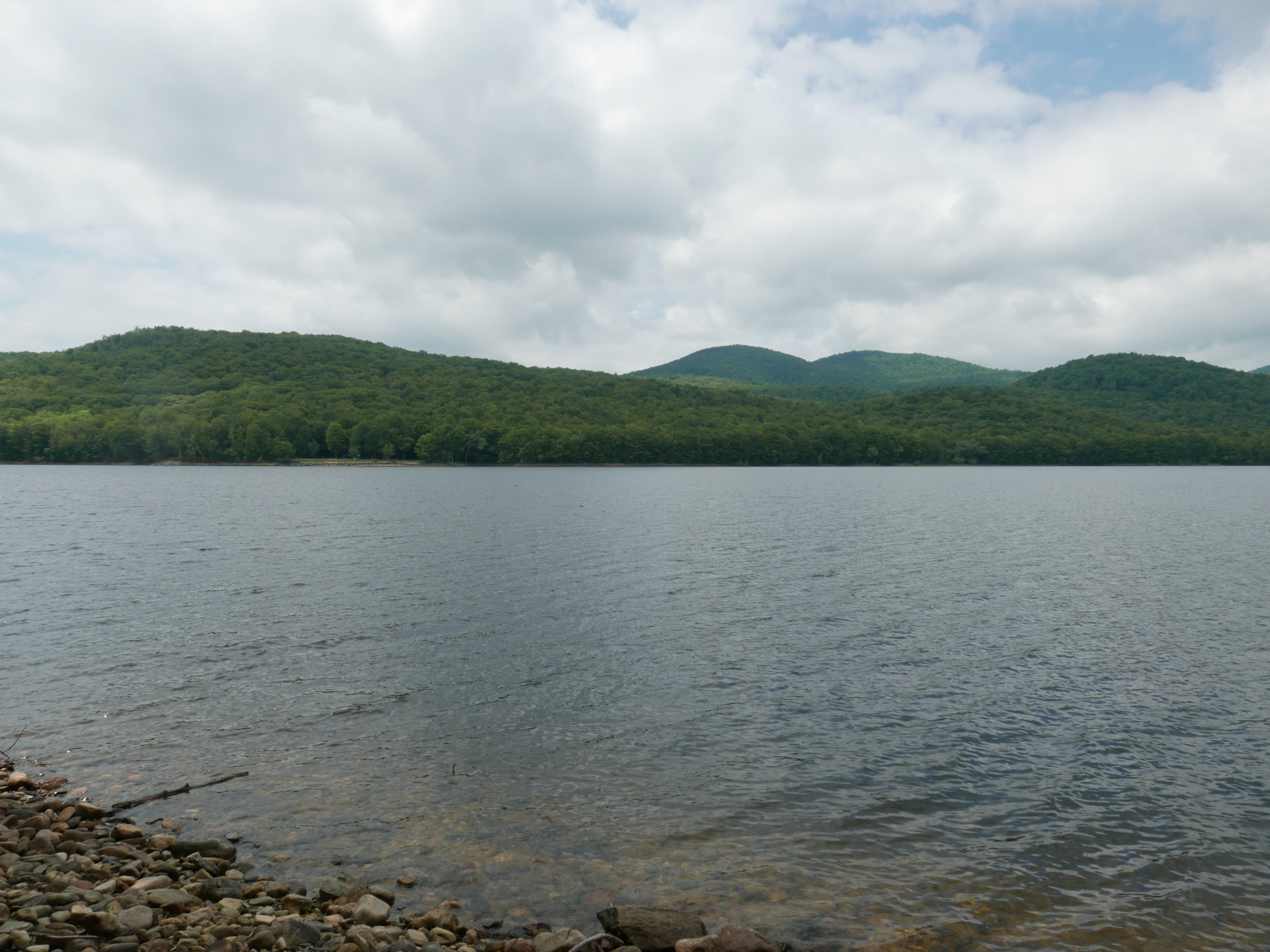 20160628_5663 Harriman Reservoir